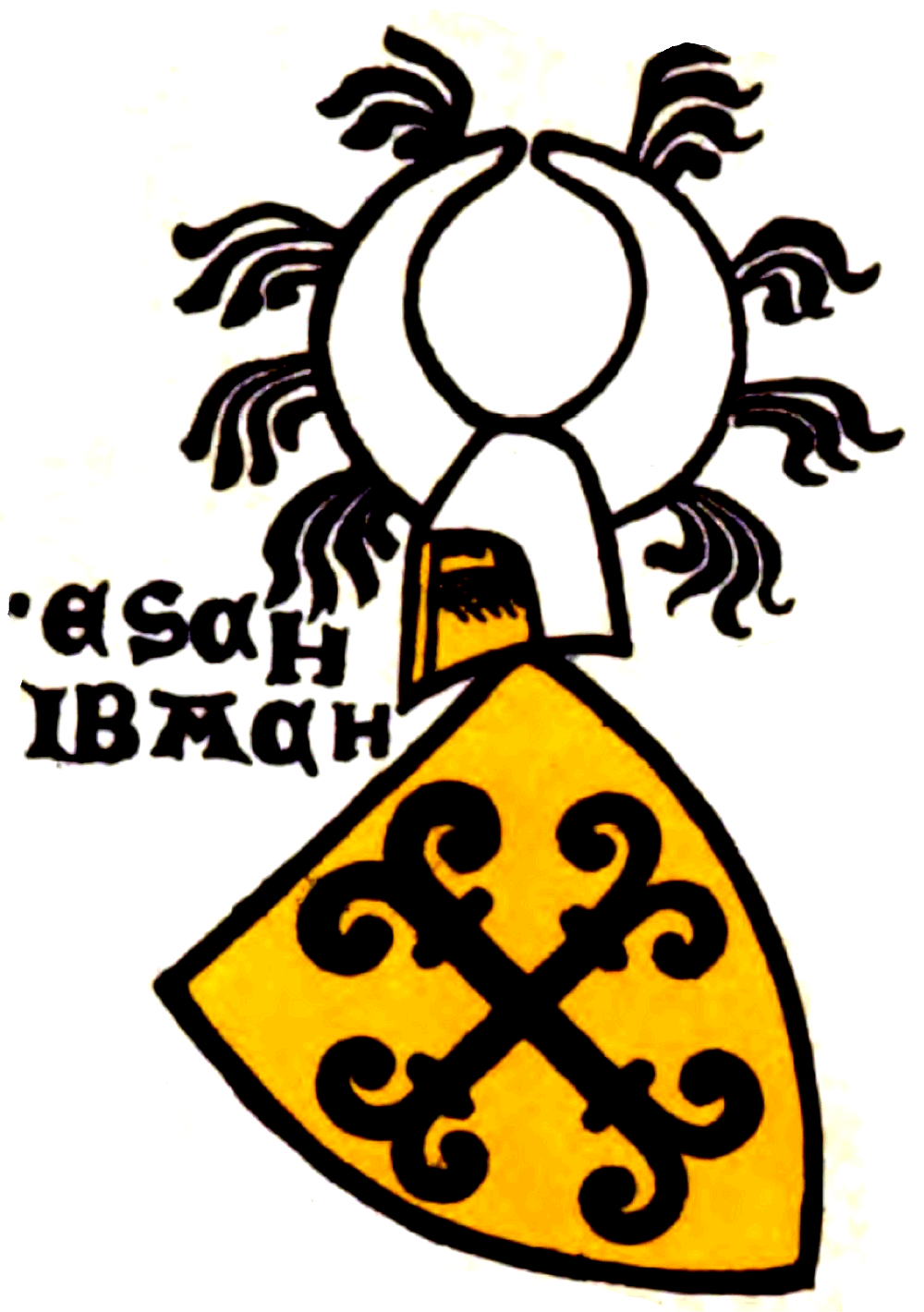 Wappen der Eschenbach (hier Eschibach)